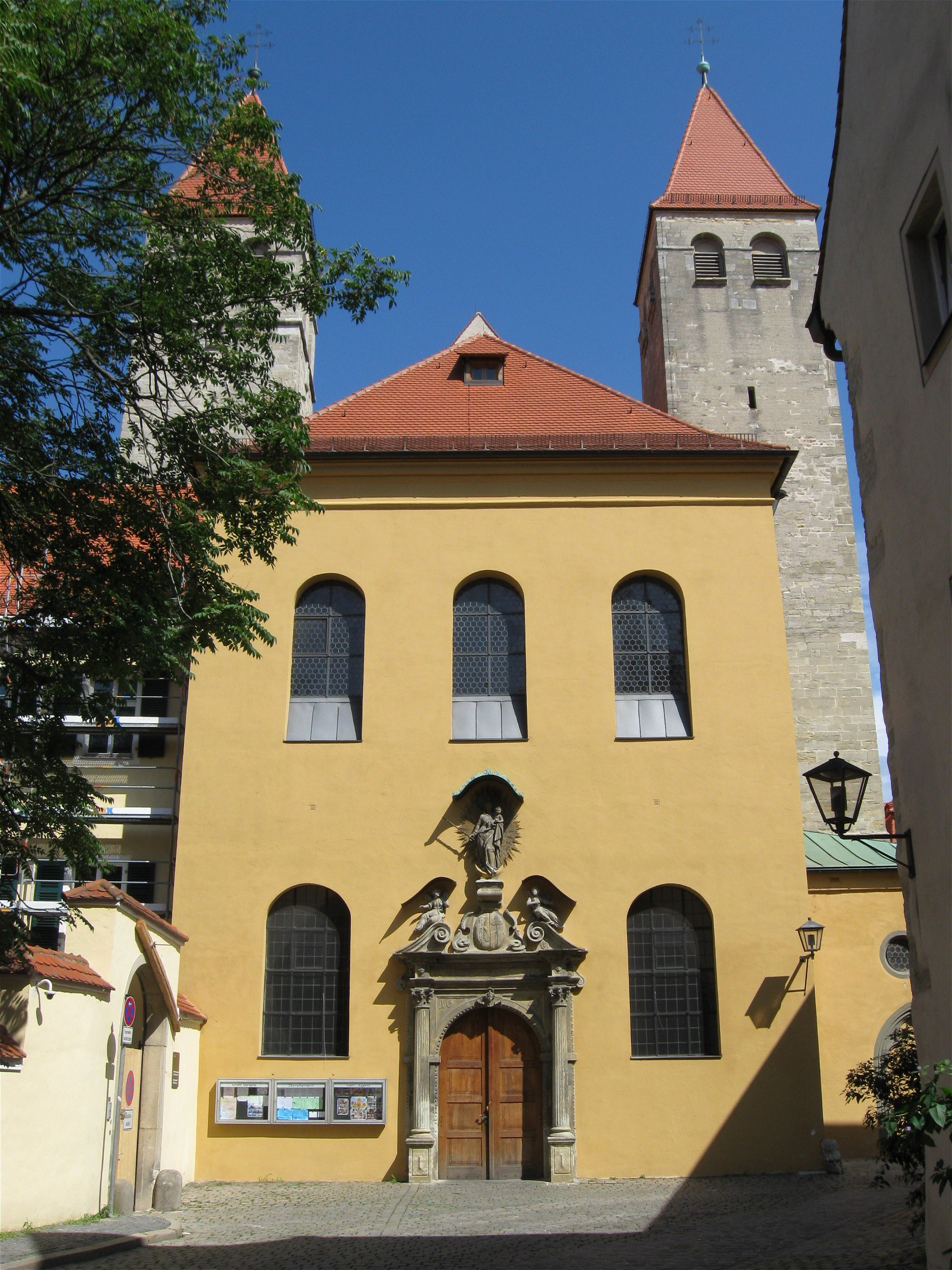 Niedermünstergasse 3; Kath. Dompfarrkirche Maria Immaculata (Niedermünster), ehem. Damenstiftskirche, dreischiffige querschifflose Pfeilerbasilika mit drei Chören, zwei Westtürmen und Vorhalle, Mitte 12. Jh., barock verändert 1621 und um 1730; mit Ausstattung.